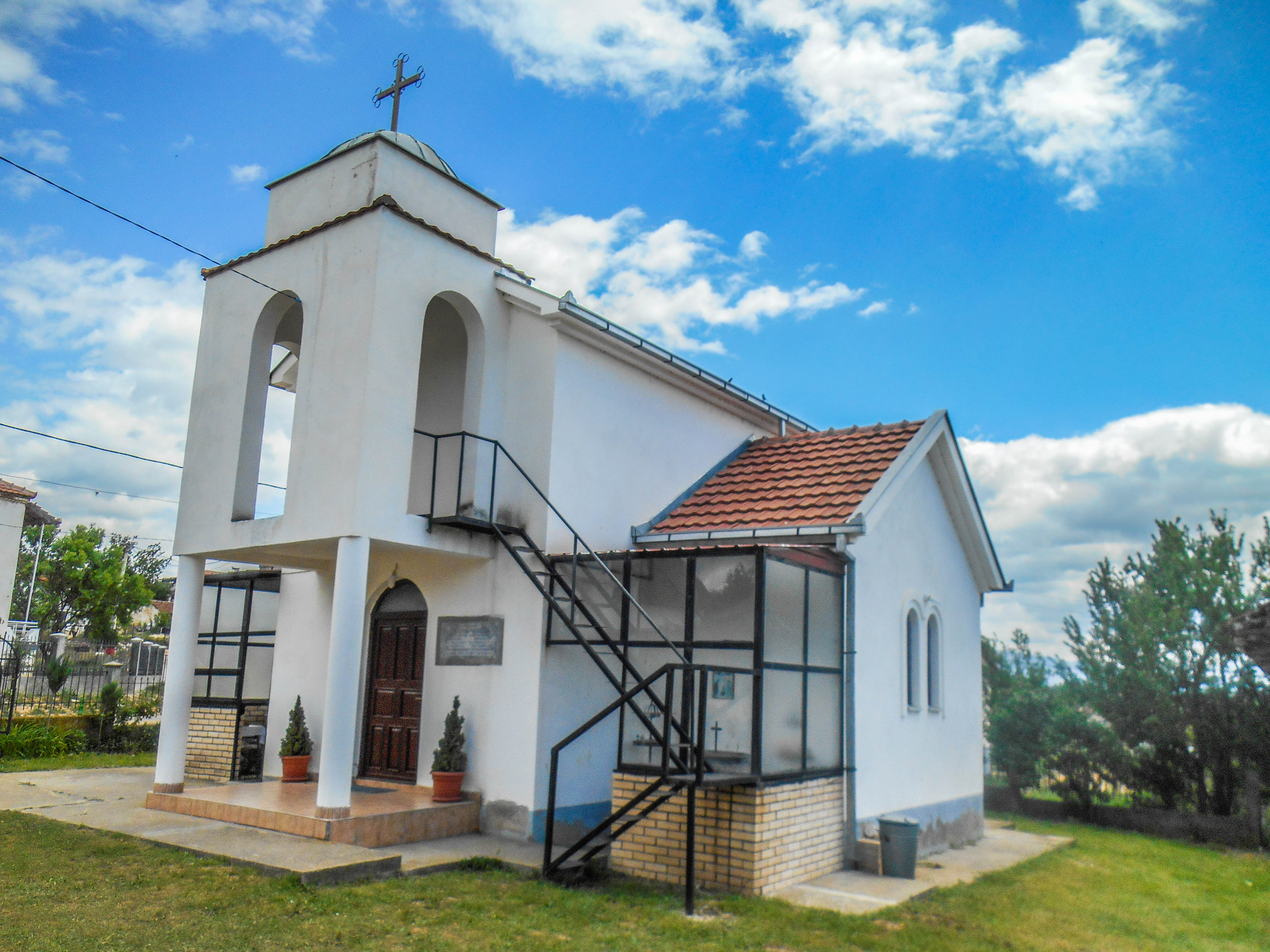 Црква „Св. Ѓорѓи“ - Едрениково